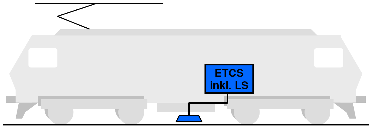 Ab 2017 können Fahrzeuge, die nur mit ETCS ausgerüstet sind, freizügig auf dem ganzen Schweizer Normalspurnetz verkehren.